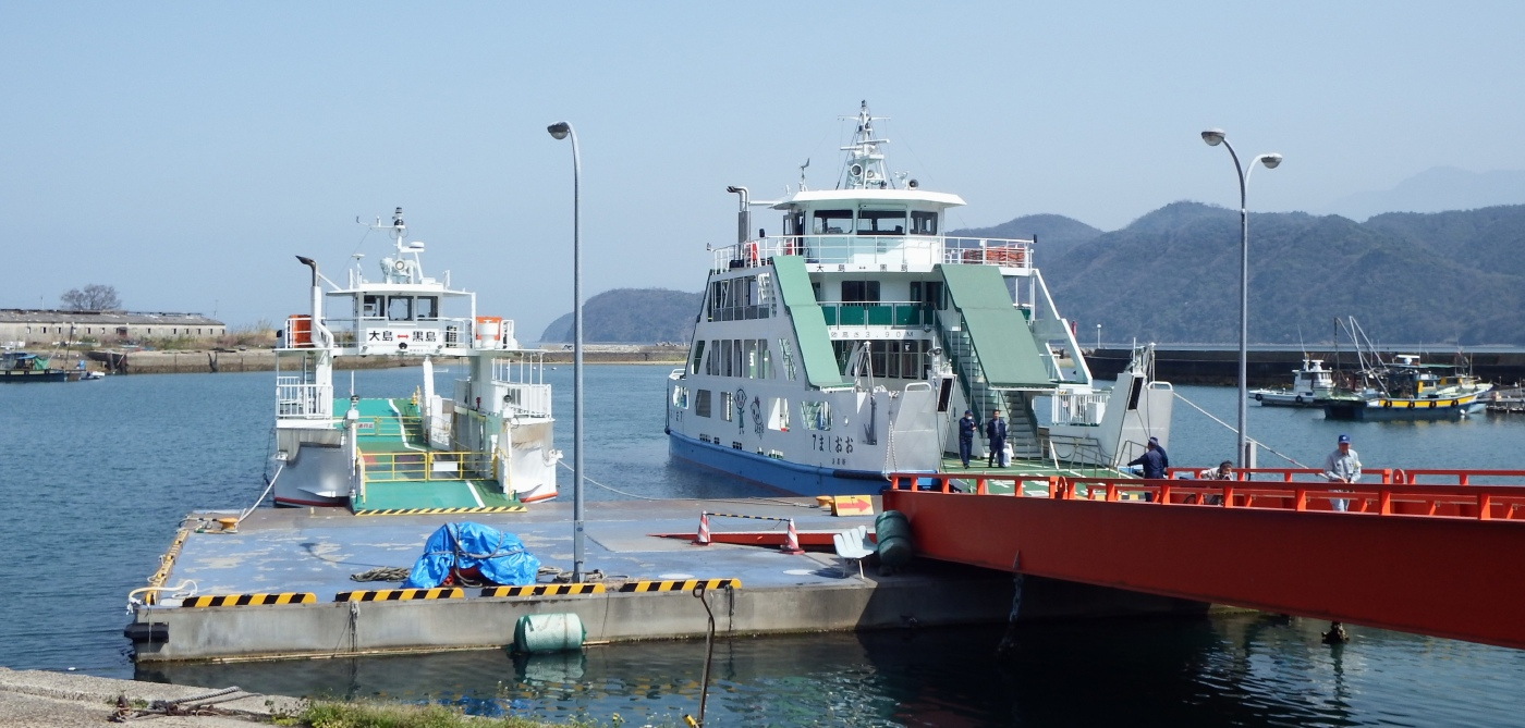 新居大島港に着岸した黒島港からの市営フェリー